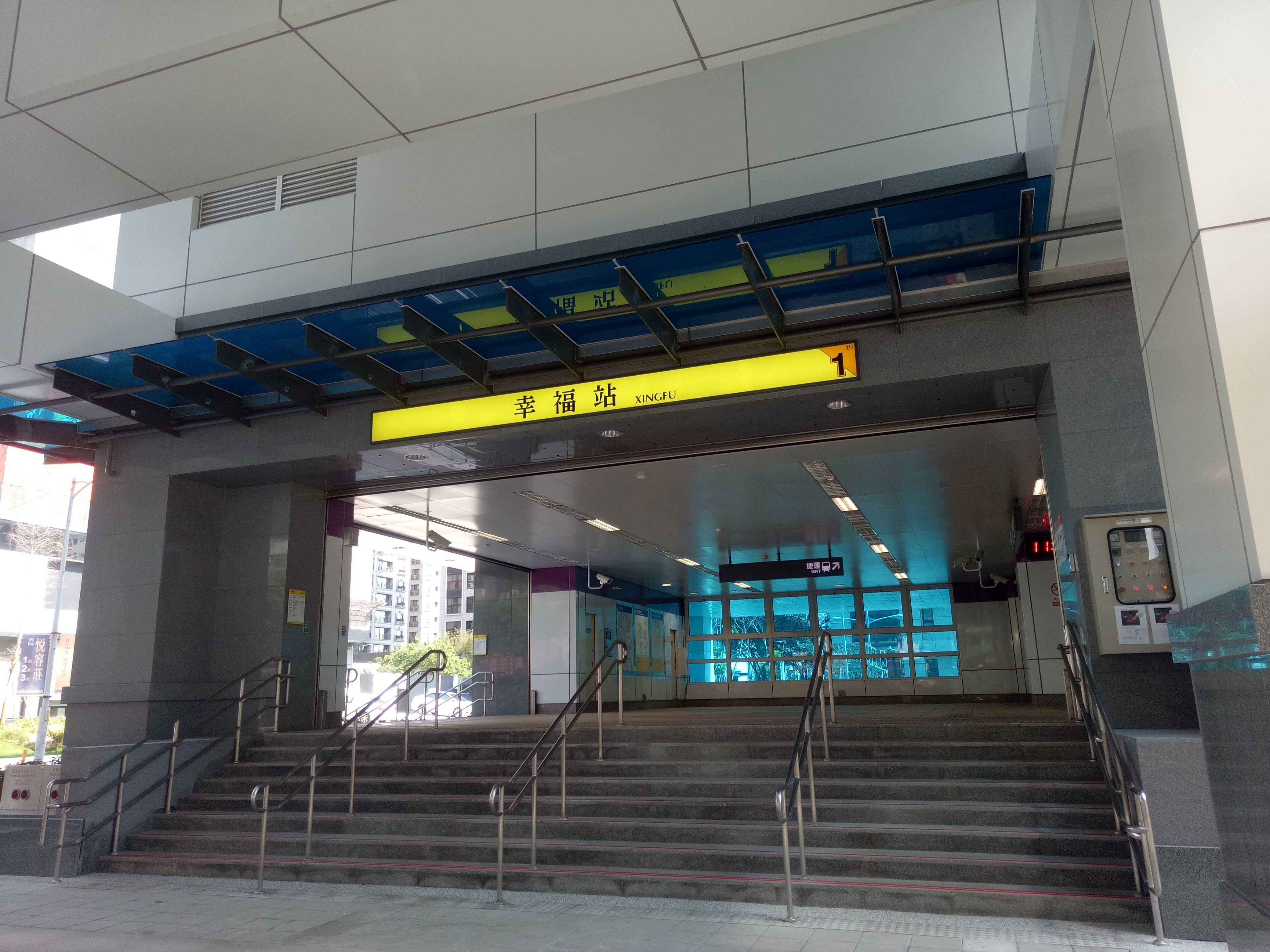 幸福站1號出口。本站位於台灣新北市新莊區市中心東側，是台北捷運環狀線第一階段的捷運車站